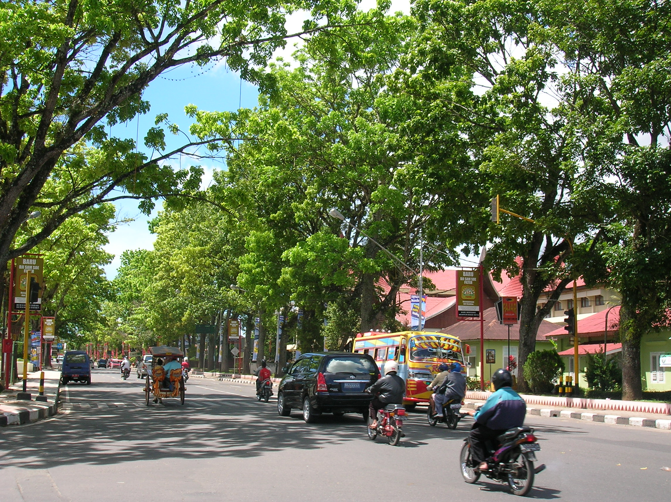 Jalan Jendral Sudirman merupakan salah satu jalan utama di Kota Bukittinggi.